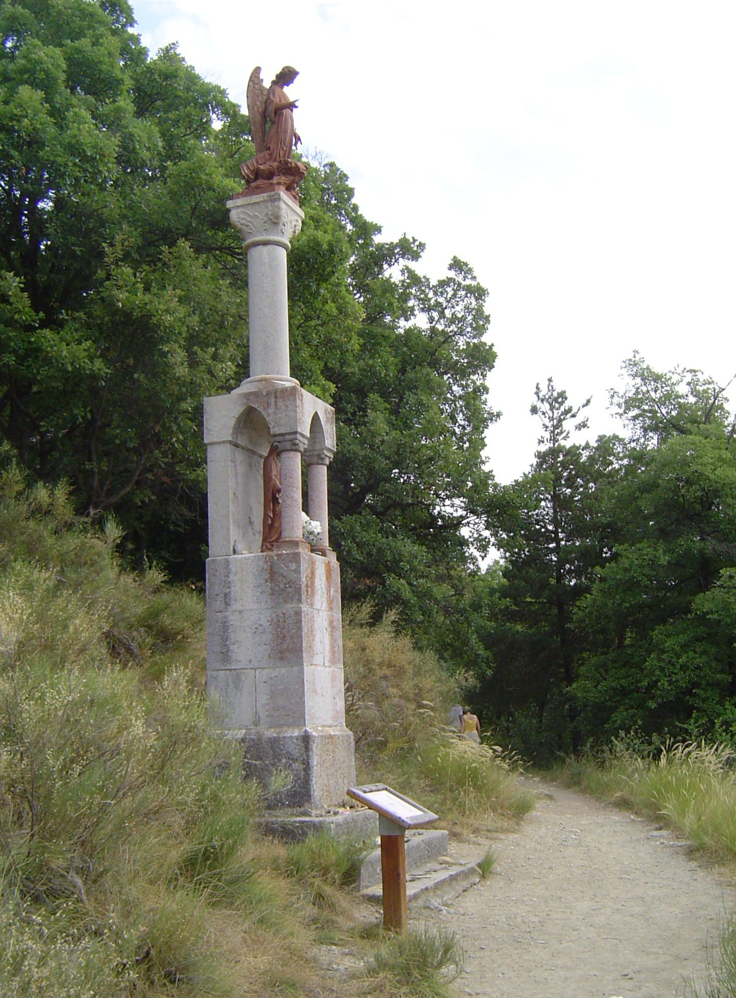 Photo prise à Notre-Dame-du-Laus